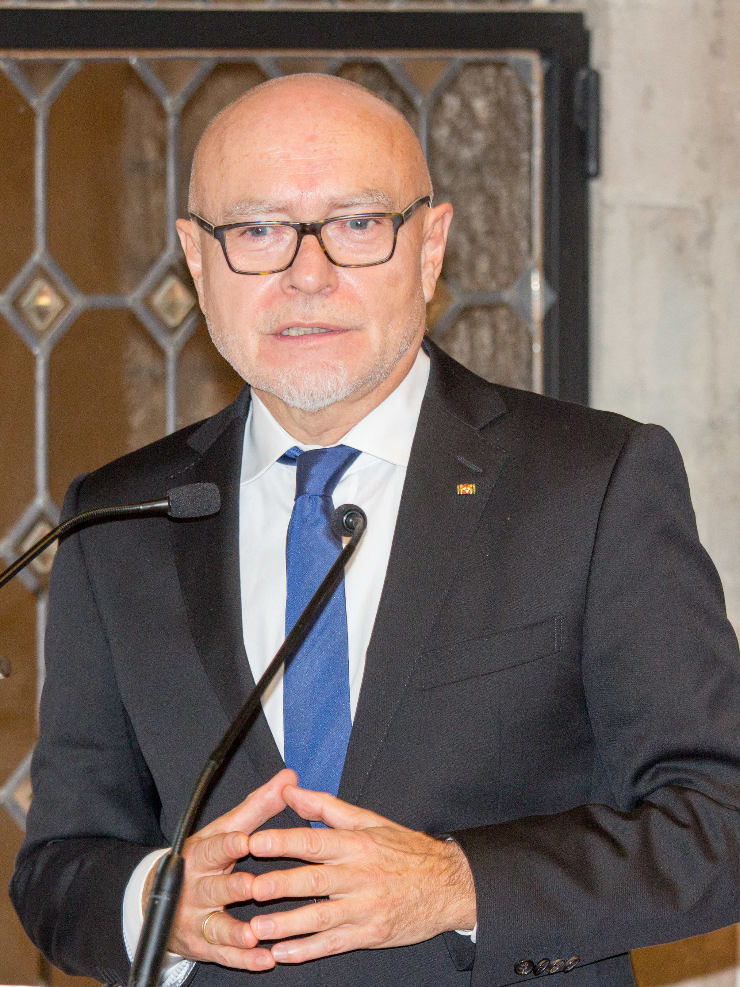 Verleihung des Europäischen Handwerkspreises an Udo Di Fabio Foto: Prof. Dr. Dr. Udo Di Fabio, Richter am Bundesverfassungsgericht a.D.